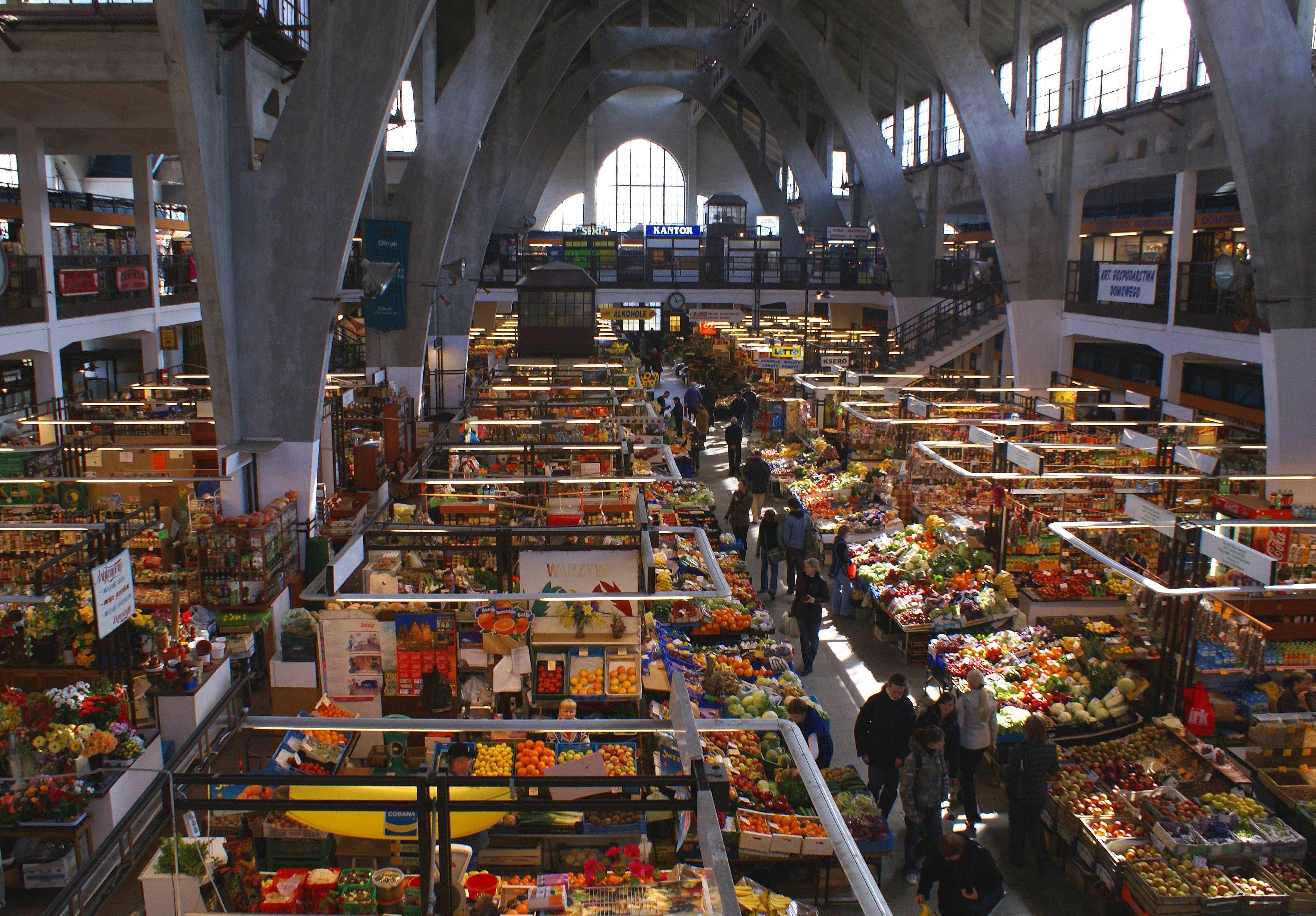 Hala Targowa we Wrocławiu, ul. Piaskowa 11/ pl. Nankiera